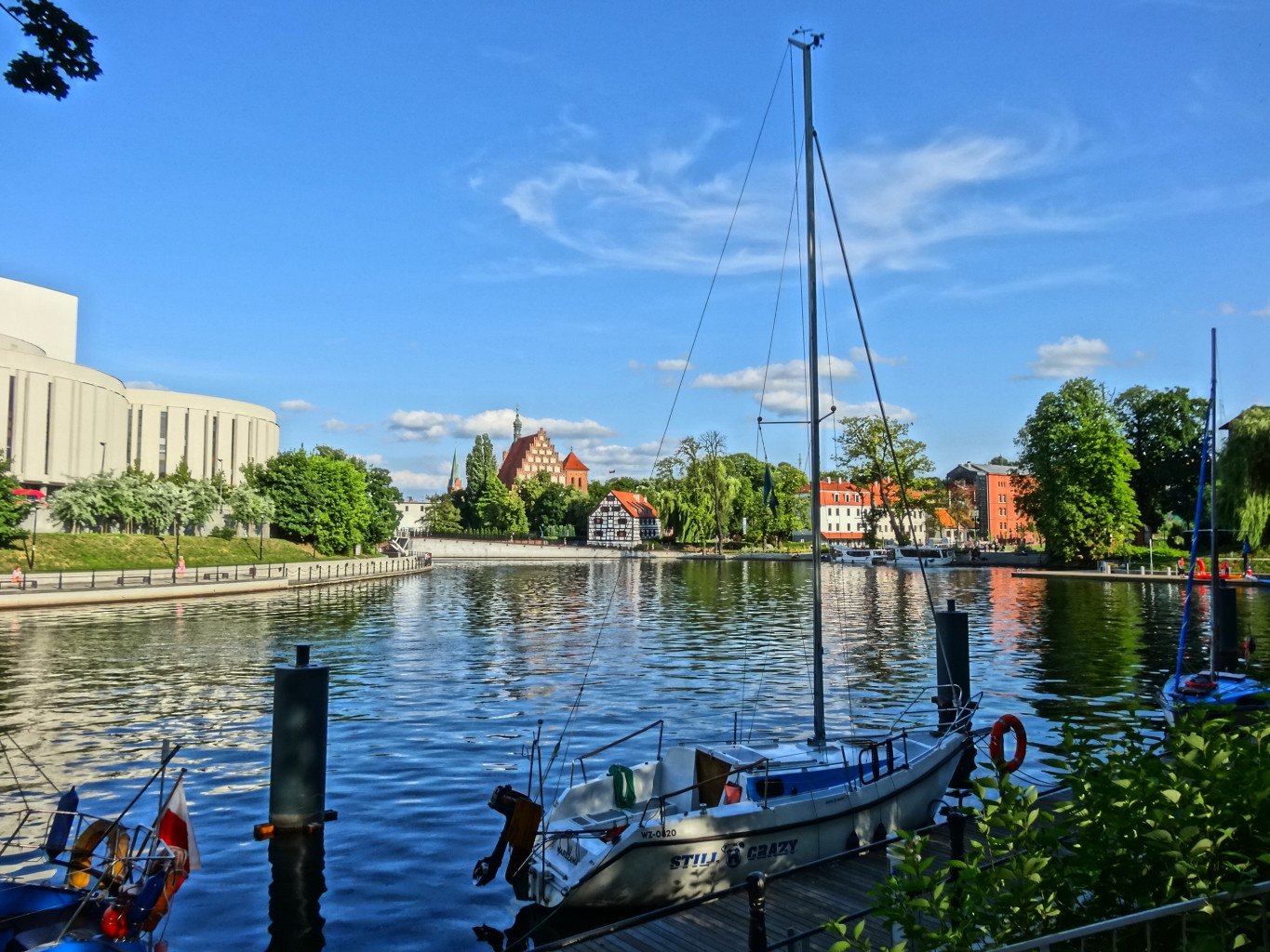 Zakole Brdy z nabrzeżem Wyspy Młyńskiej w Bydgoszczy. Na pierwszym planie przystań .